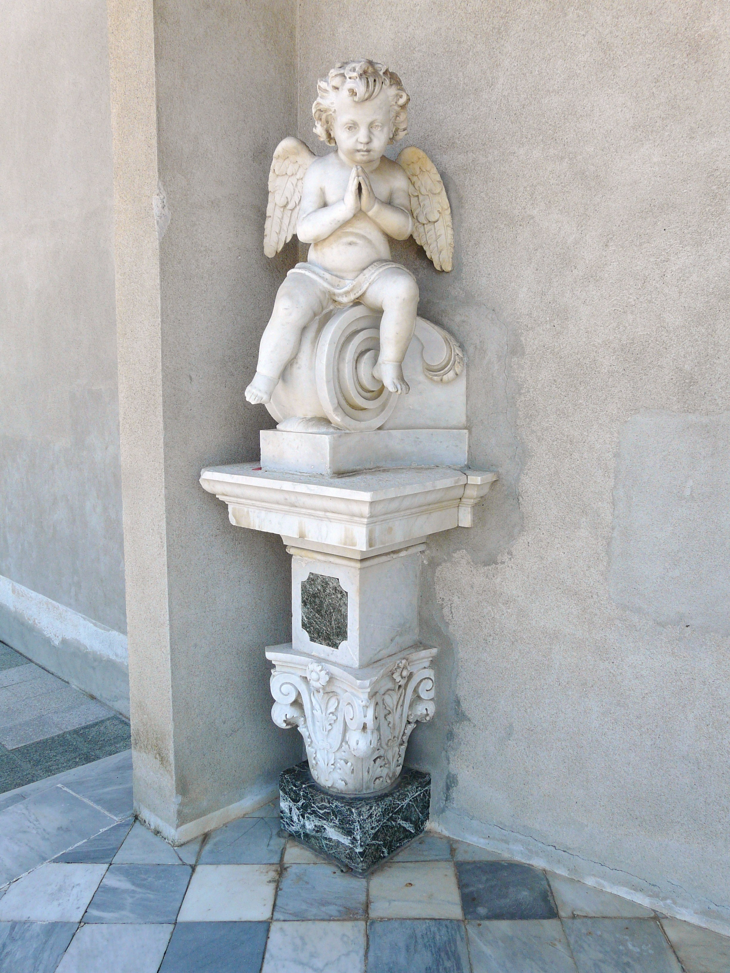 Chiesa di San Siro, Viganego, Bargagli, Liguria, Italia